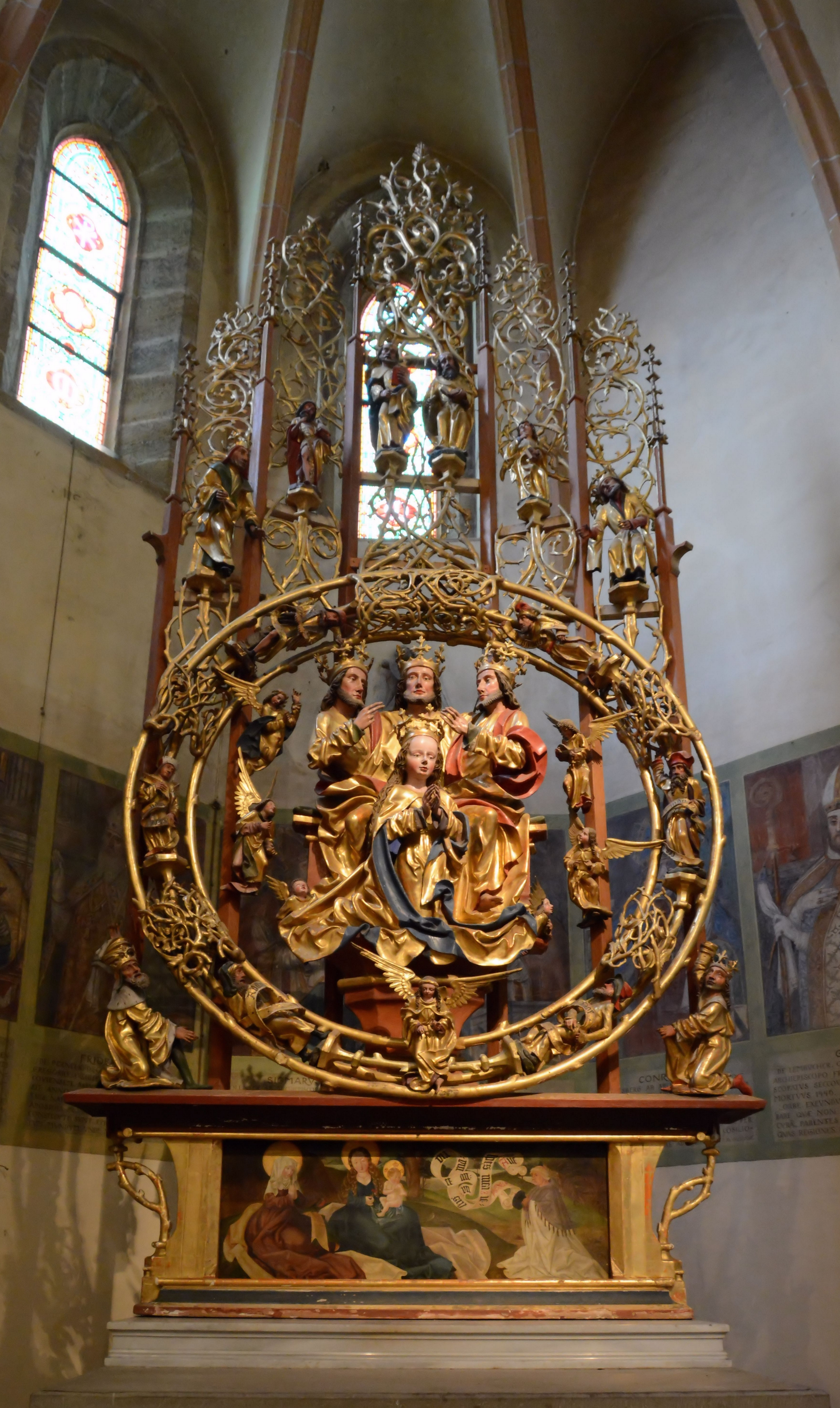 Basilika Seckau, Bischofskapelle, Maria-Krönungsaltar